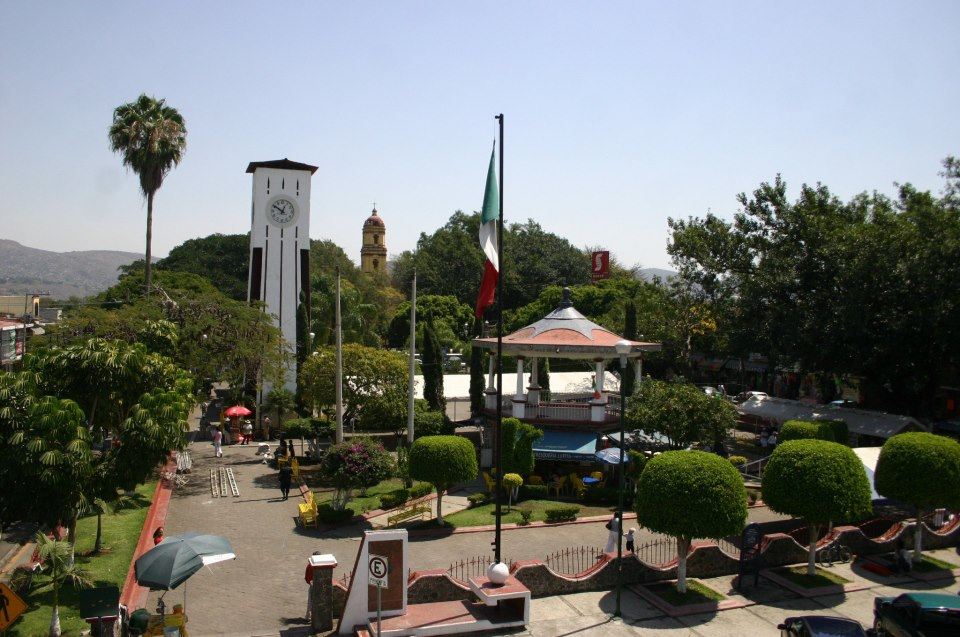 Zocalo de Jiutepec - 1990 - 2006